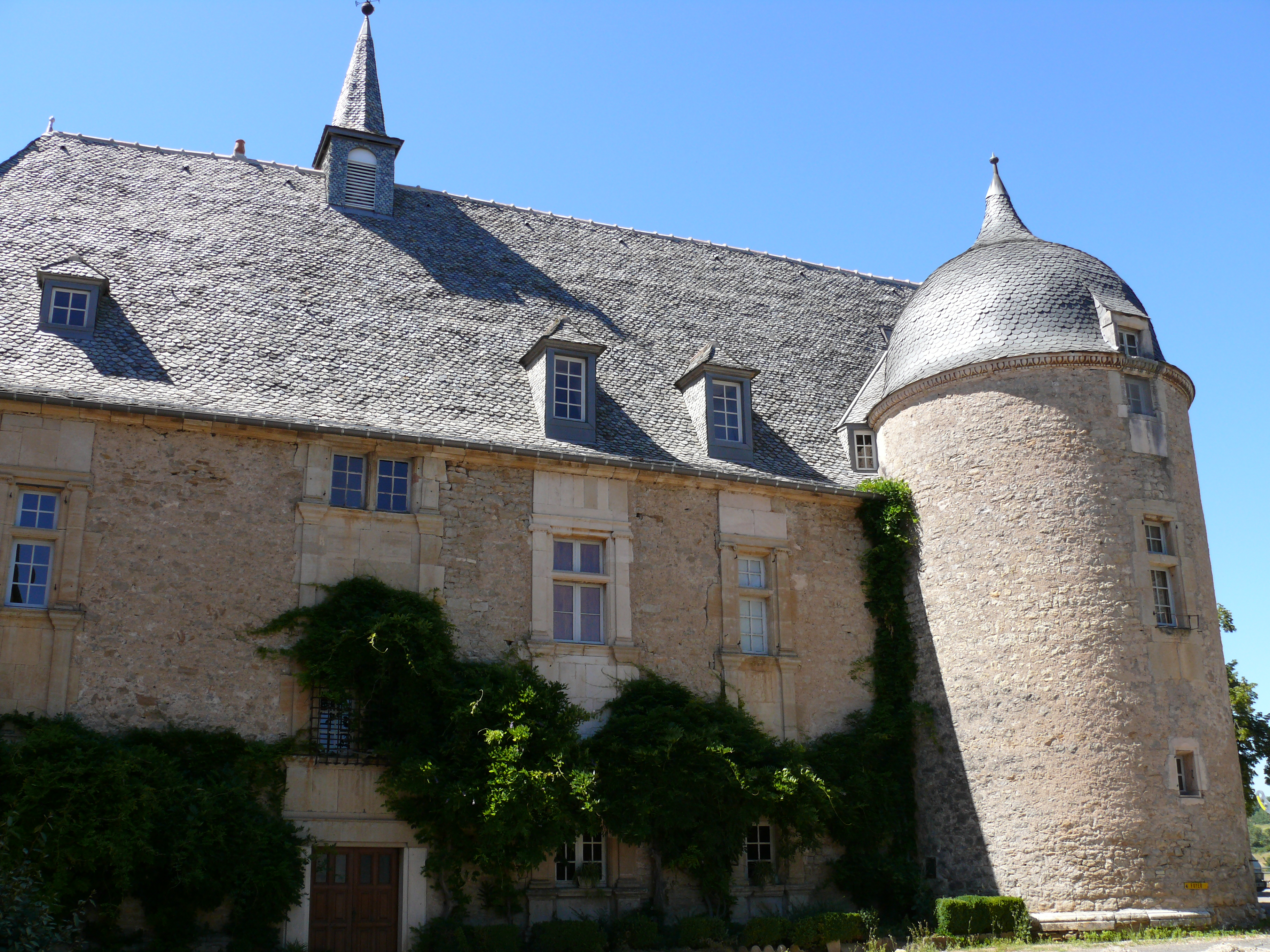 Villefranche-de-Rouergue - Château de Graves